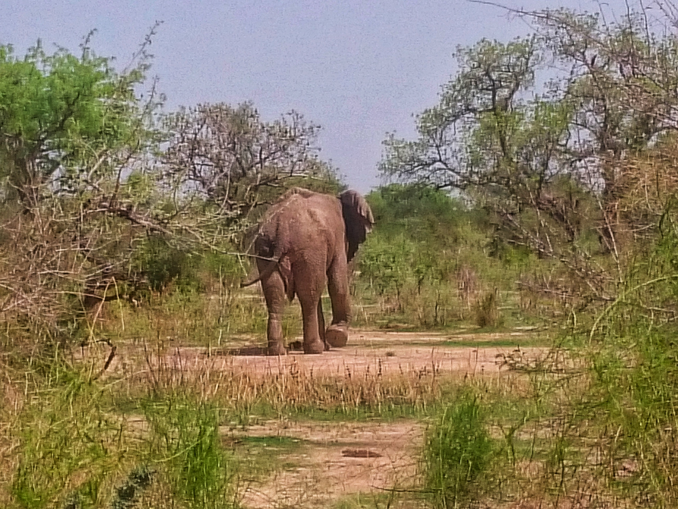 Les éléphants dans la réserve faunique de Kalfou. Localisation : Mayo-Danay, Extrême-Nord